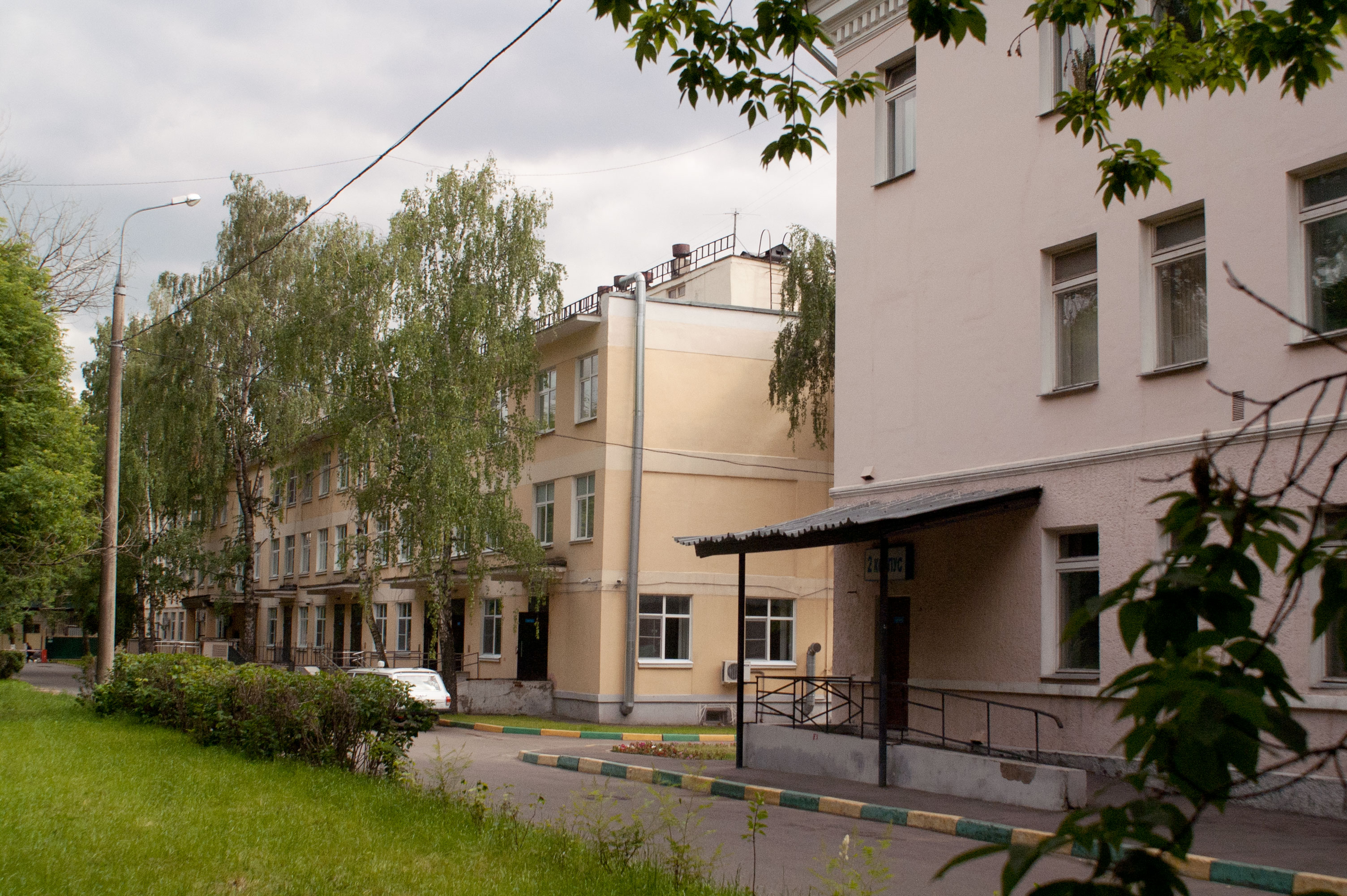 Второй Курьяновский проезд (Москва) Больница